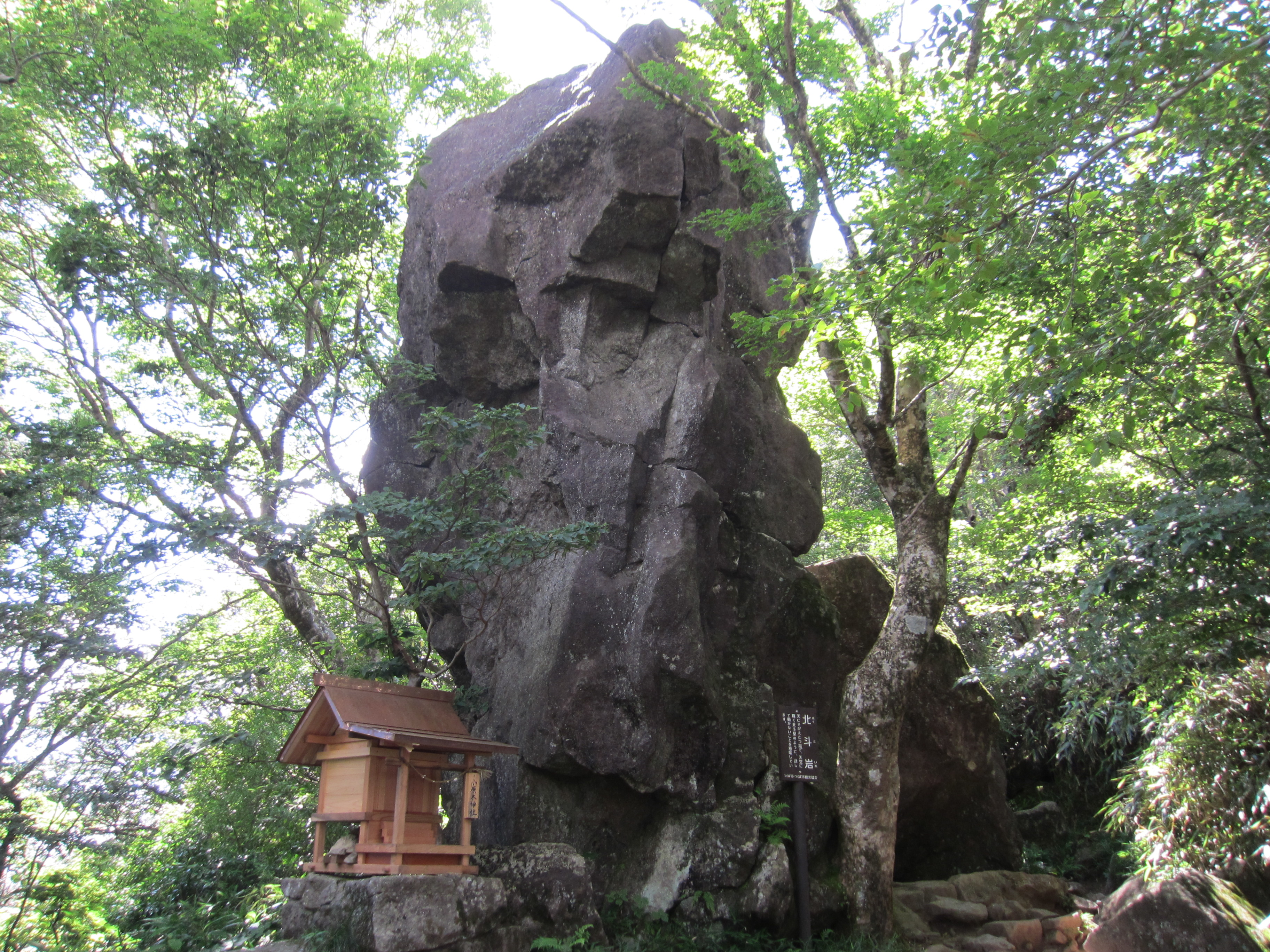 筑波山神社 小原木神社と北斗岩